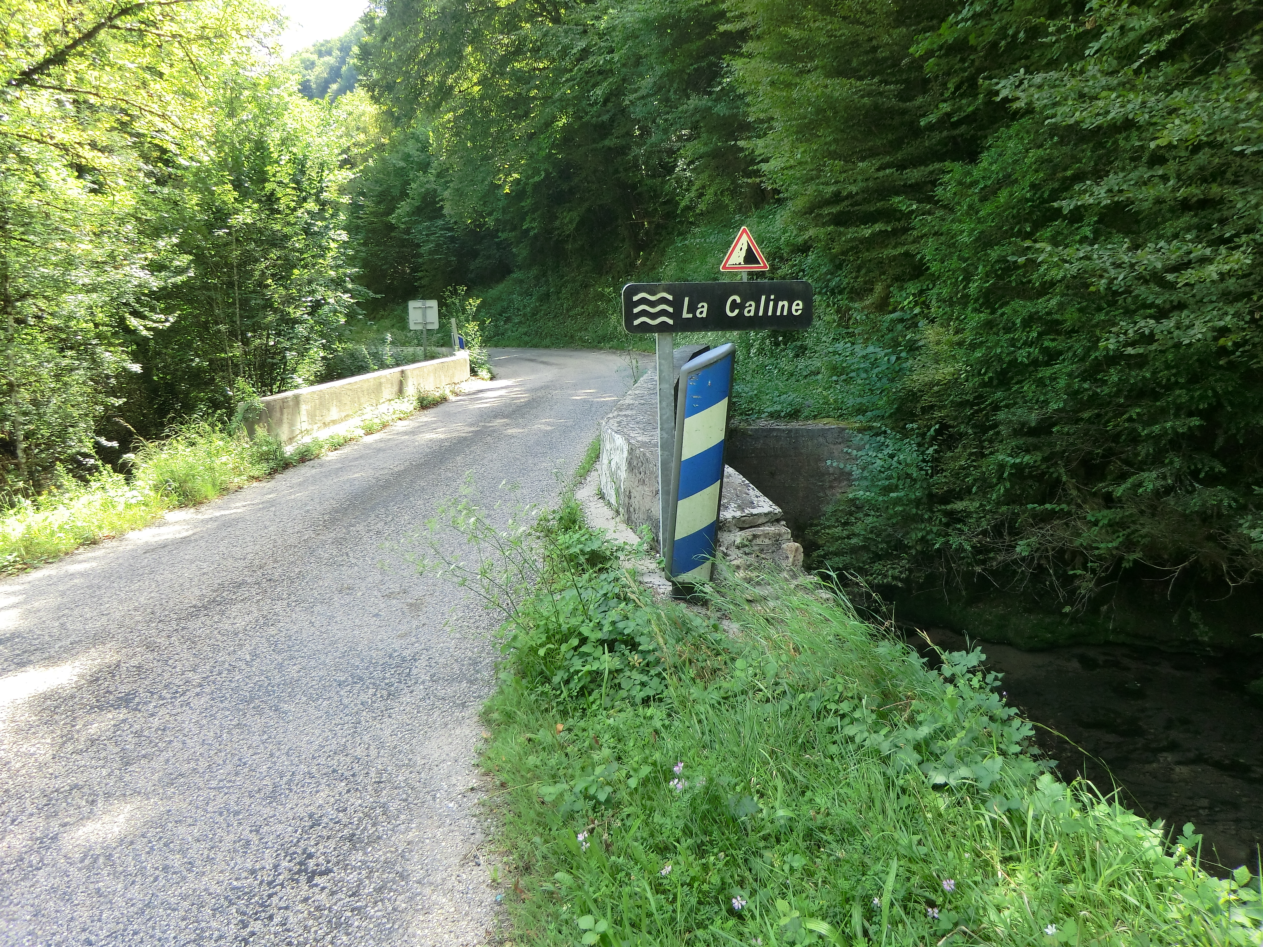 Panneau de la Câline dans le Bugey.